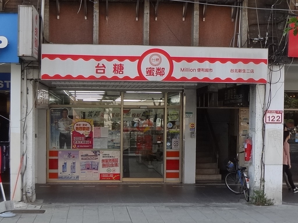 台糖蜜鄰便利超市台北新生二店，位於臺北市大安區新生南路一段122之1號1樓。